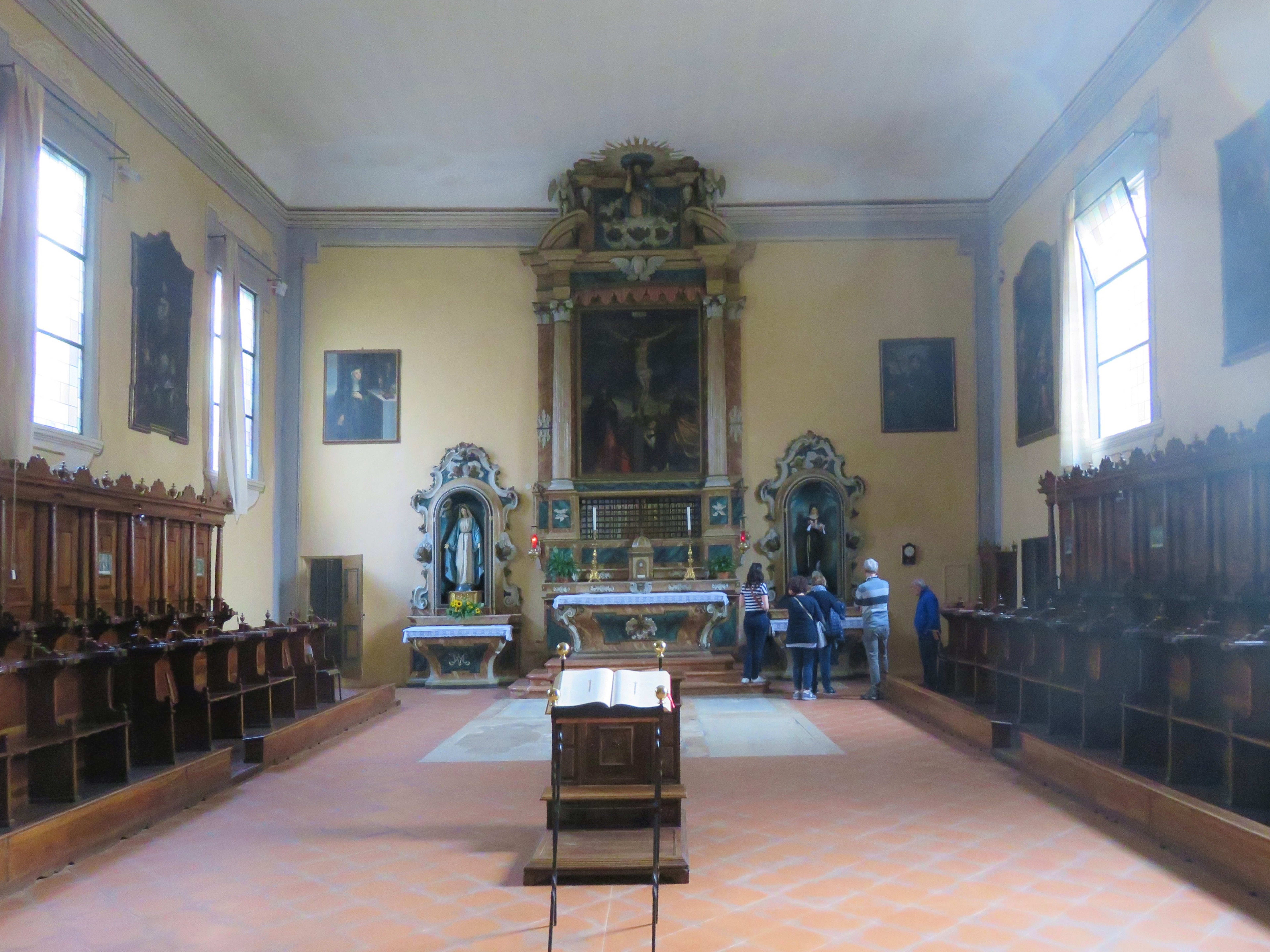 Sala del Coro del Monastero del Corpus Domini dove sono sepolti personaggi illustri della famiglia d'Este